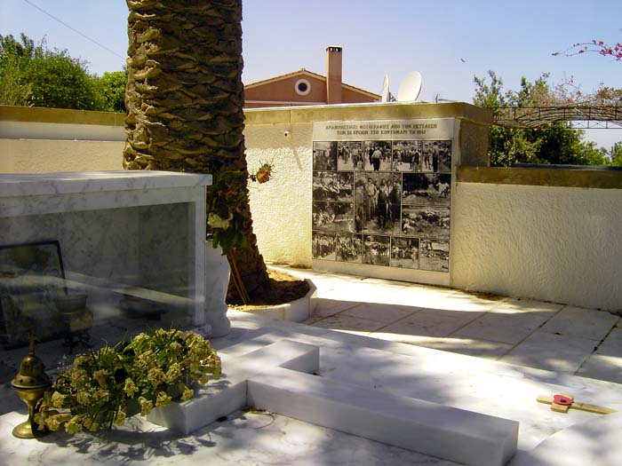 Übersichtsbild der Gedenkstätte